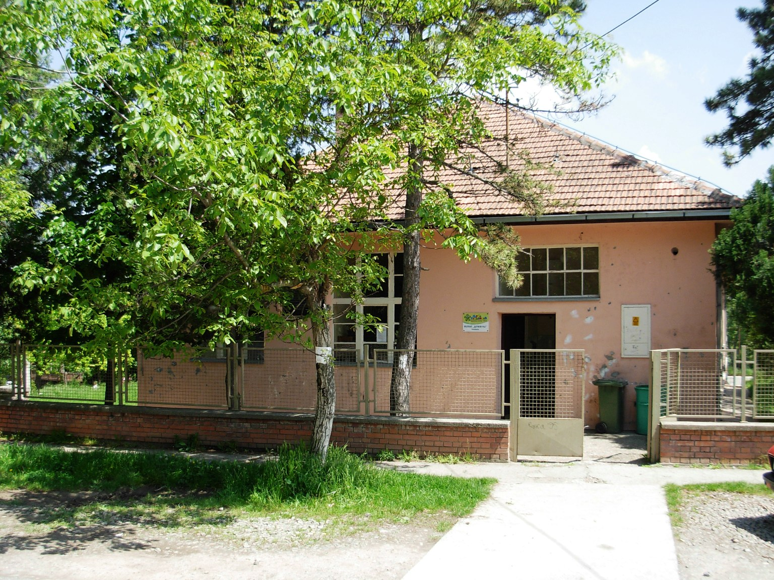 Vrtić "Dečji raj" u Rakovcu.